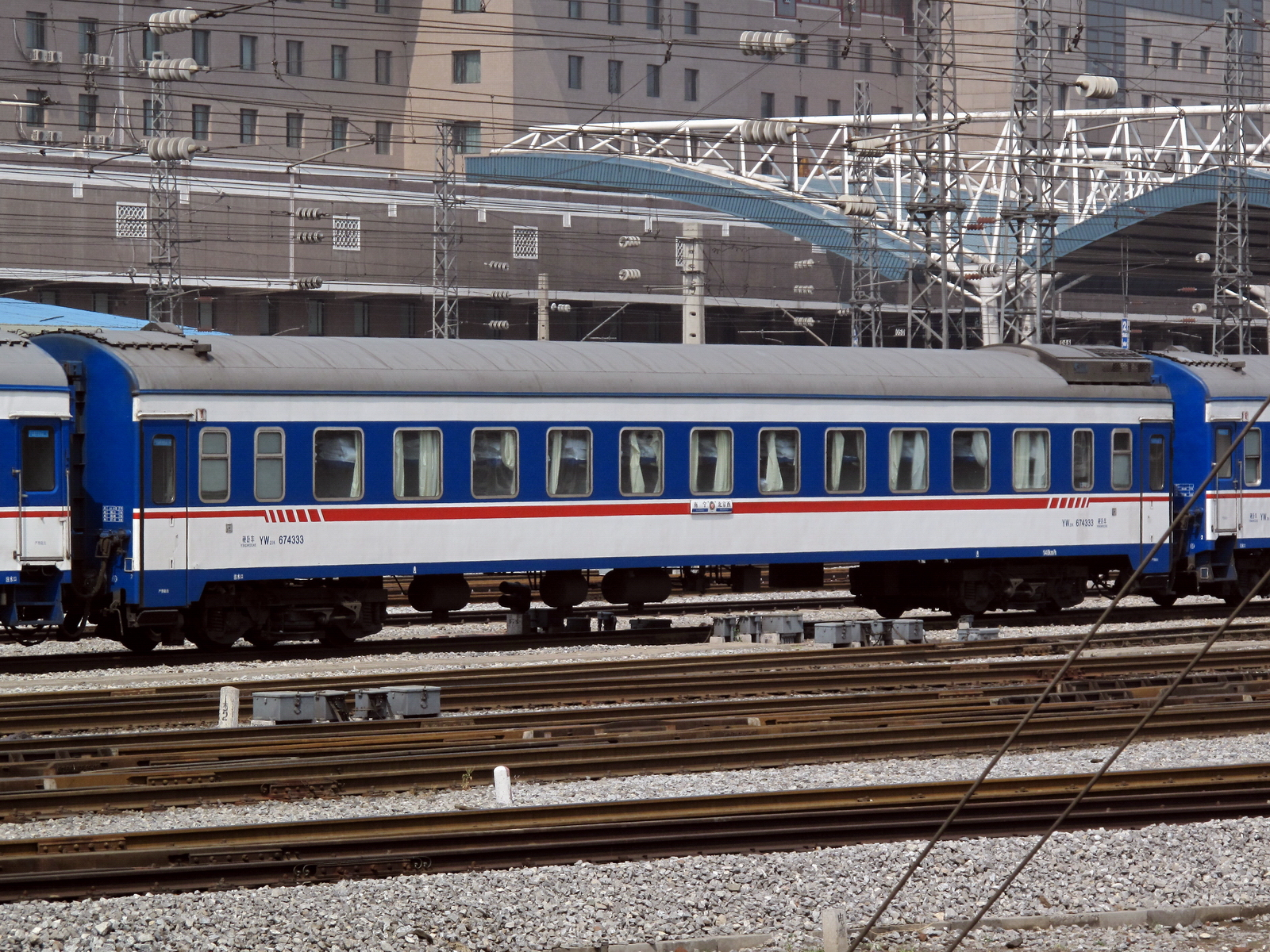 T5/6次特快列车编组中的YW25K硬卧车，使用长客厂CW-2B型转向架，车门采用密闭式塞拉门，拍摄于北京西客站